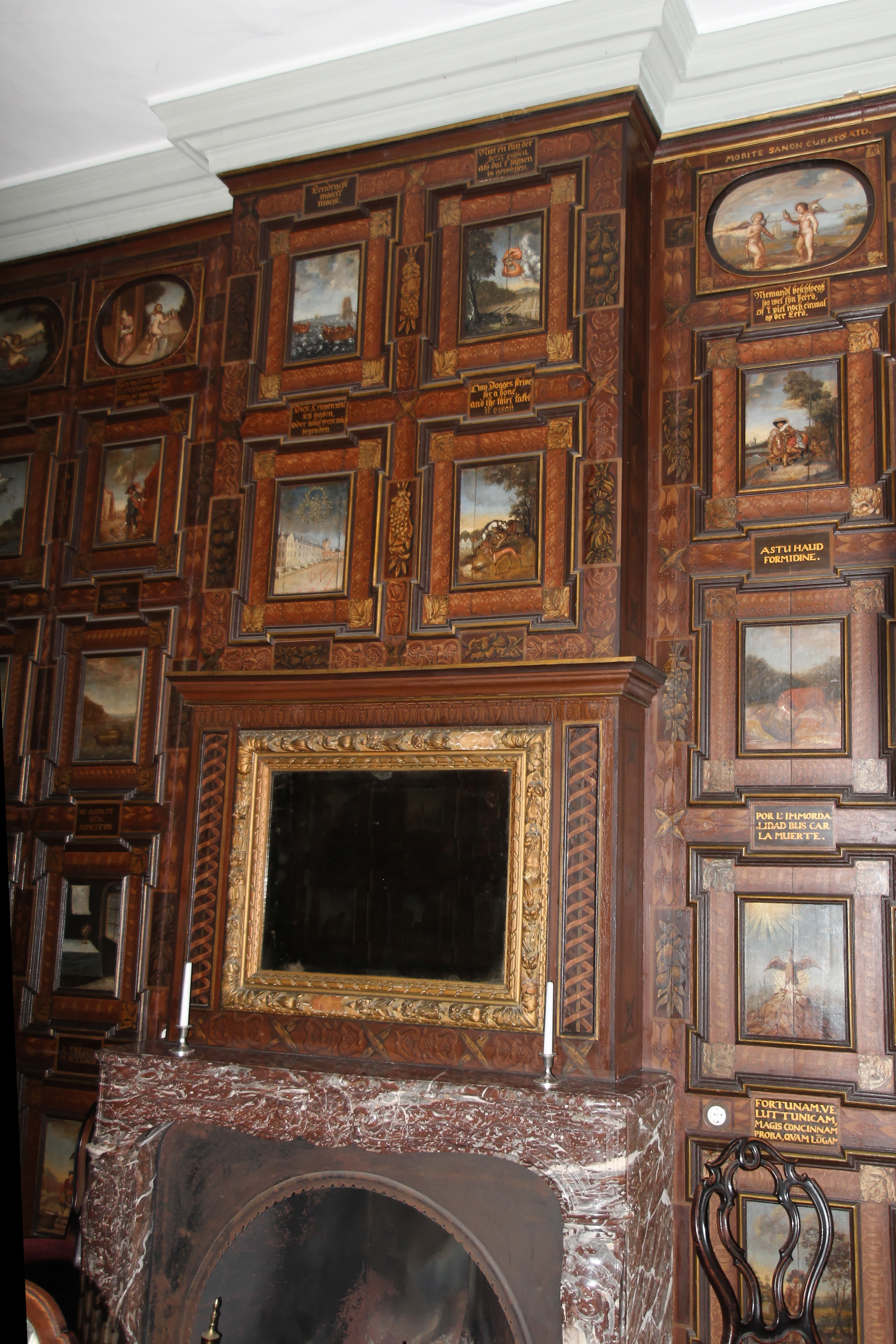 Waabs, Gut Ludwigsburg; Bunte Kammer